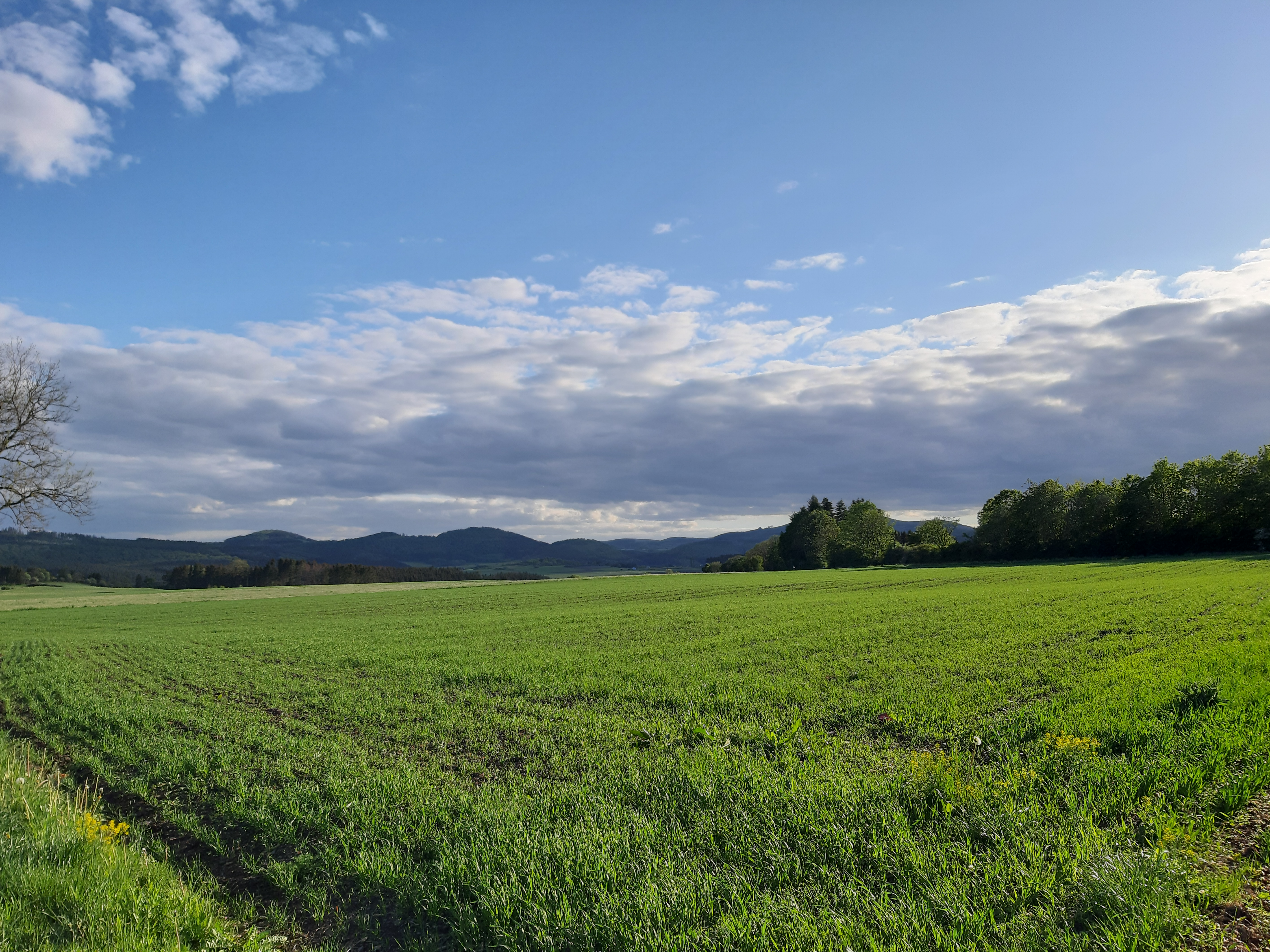 Blick auf die Medebacher Bucht; im Hintergrund Linsenberg (566,2 m, links), Stemmberg (572,2 m, halblinks) und Bollerberg (775,9 m, halbrechts, Gipfel von Bäumen verdeckt)